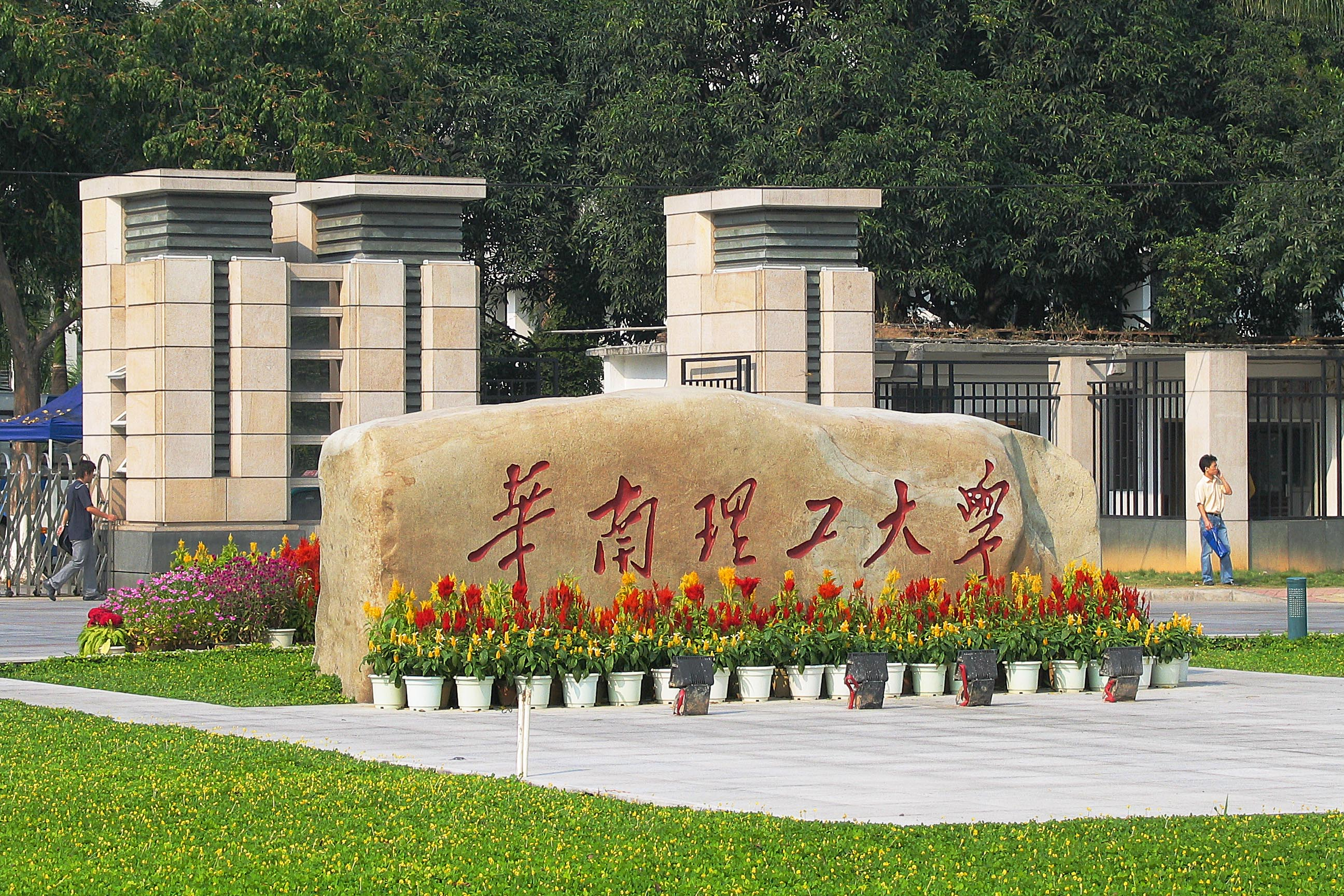 华南理工大学，正门刻石